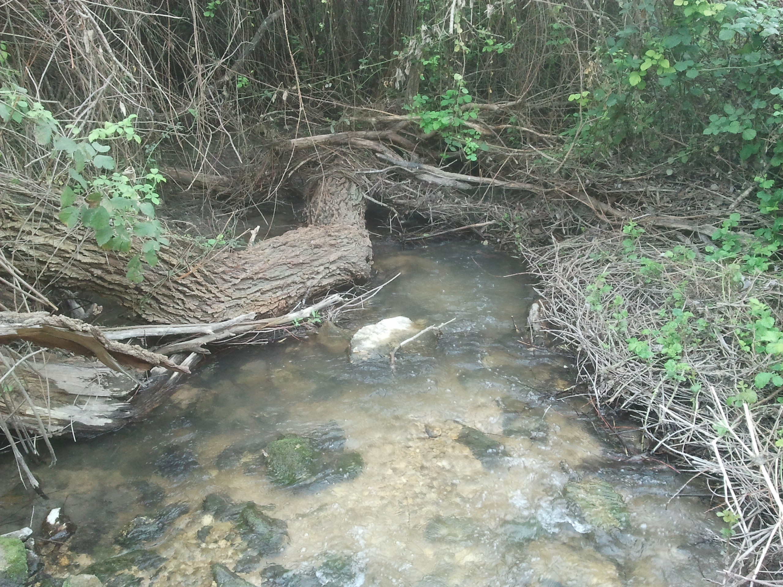 נחל תות מהווה גבול בין הר הכרמל ורמות מנשה. תחילתו ליד מחלף אליקים והוא נשפך לנחל דליה ליד בת שלמה